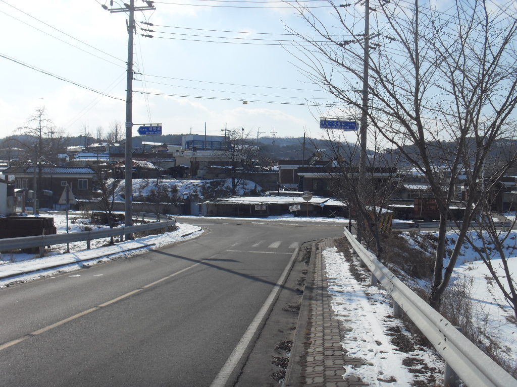 내판로와 새말다복동길 분기점